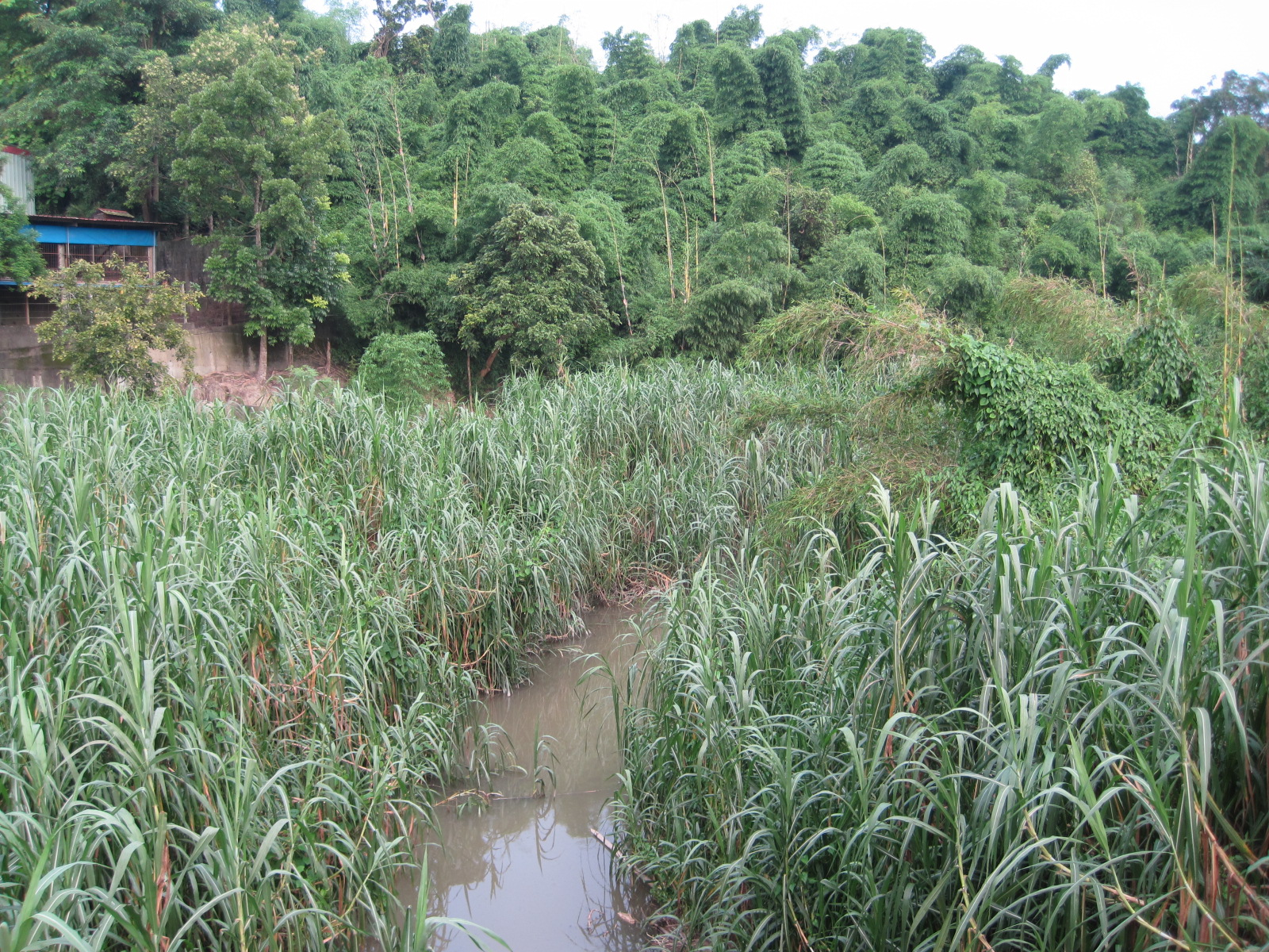 臺灣高雄市內門區的番仔鹽溪